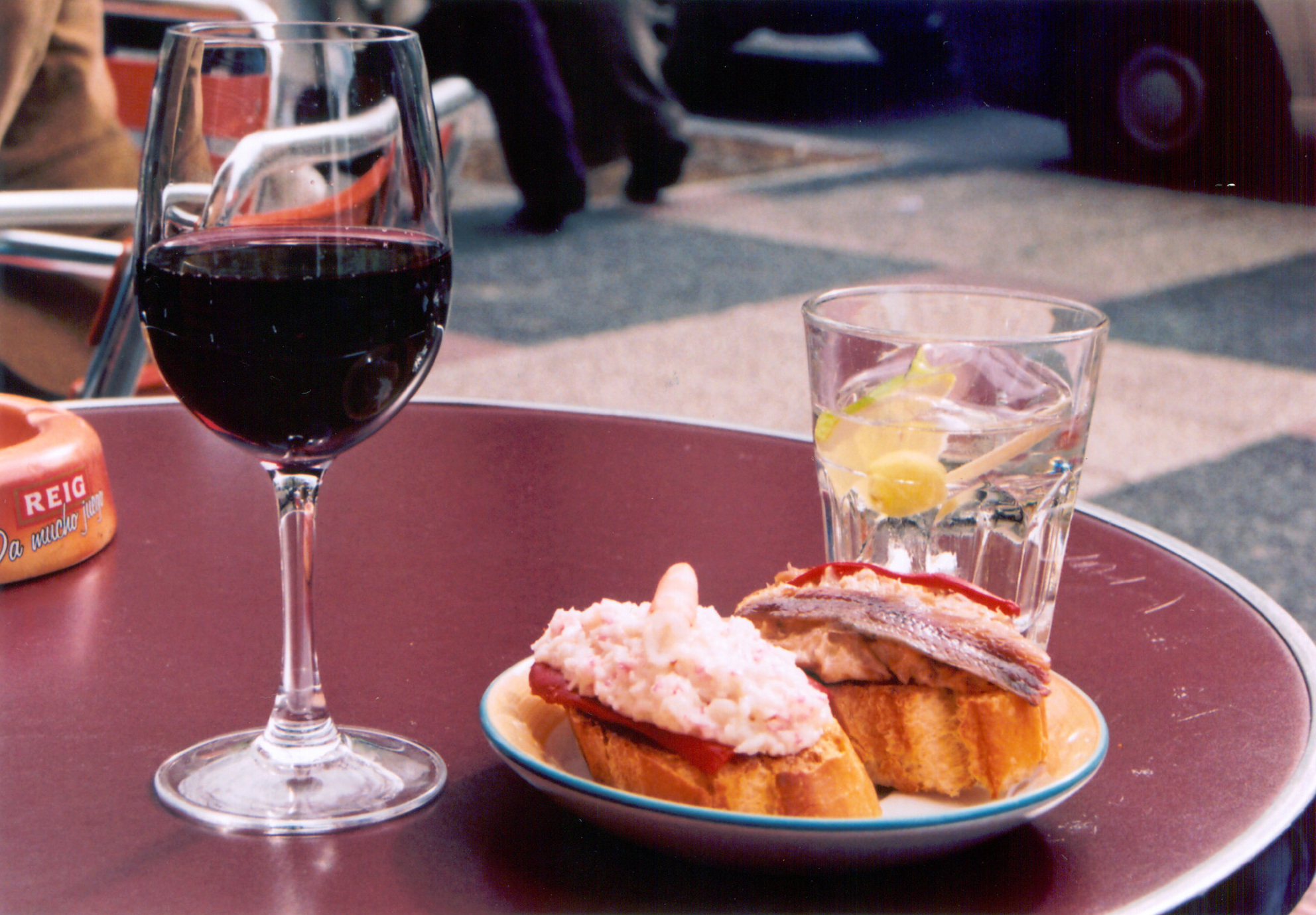 Plato con dos pinchos: txaka (cangrejo/surimi) y gamba (izquierda), bonito y anchoa (derecha), ambos con pimientos rojos, servidos en Vitoria-Gasteiz (País Vasco) con una copa de vino tinto de La Rioja y un marianito blanco (martini pequeño). Taken by myself, october 2005. --Ardo Beltz 15:08, 13 November 2005 (UTC) A cropped version exists at Image:Rioja wine crop of ImagePinchos aperitivo.JPG.